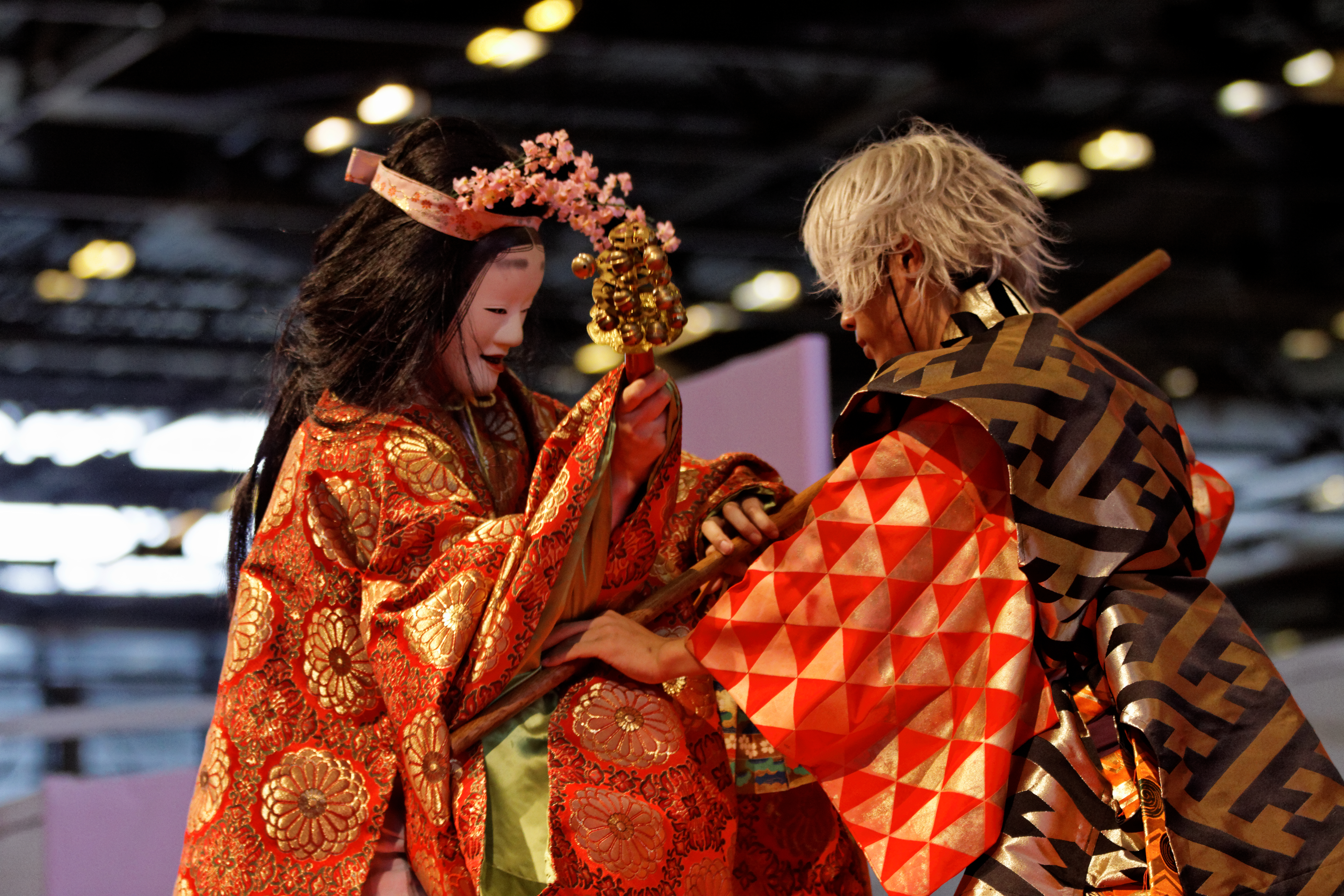 La troupe Bugakuza jouant une pièce de Kabuki à Japan expo 2012.